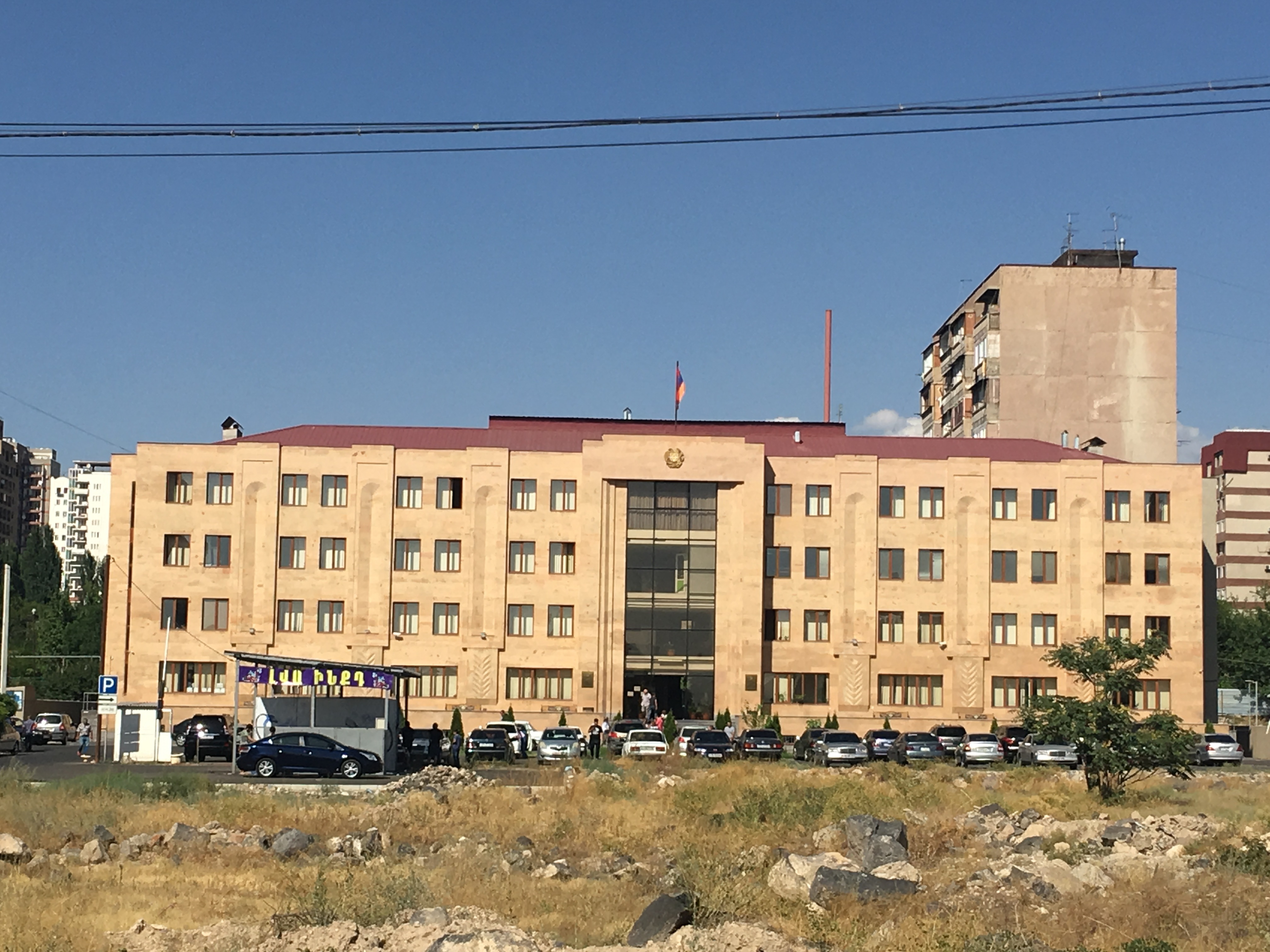 ՀՀ Ոստիկանության Անձնագրային և Վիզաների Վարչություն, երևան, Հայաստան